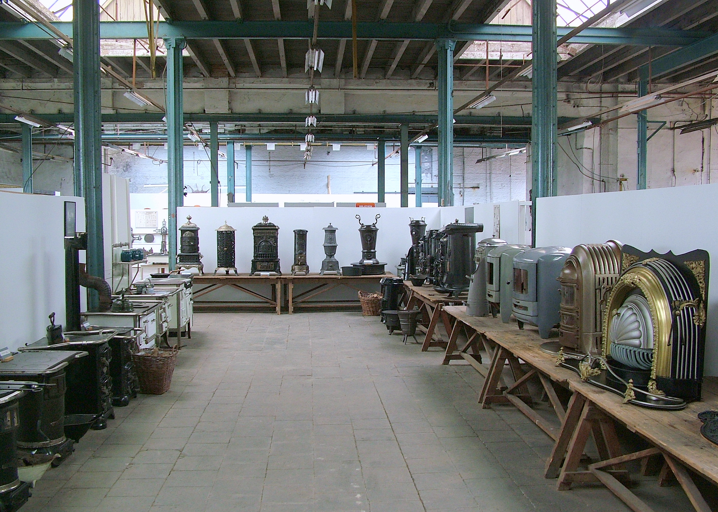 Tentoonstelling voormalig DRU-terrein.